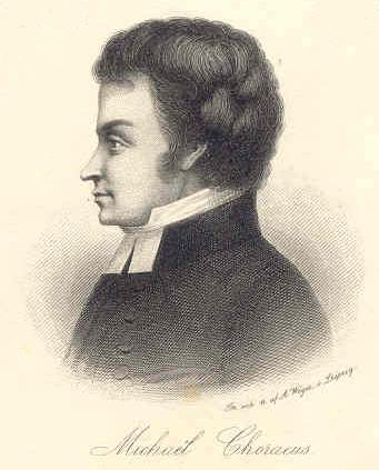 Mikael Choraeus, såsom planschbild i "Svenska vitterhetens häfder, efter Gustaf III: s död. Tredje delen", av Gustaf Ljunggren, Lund 1881.